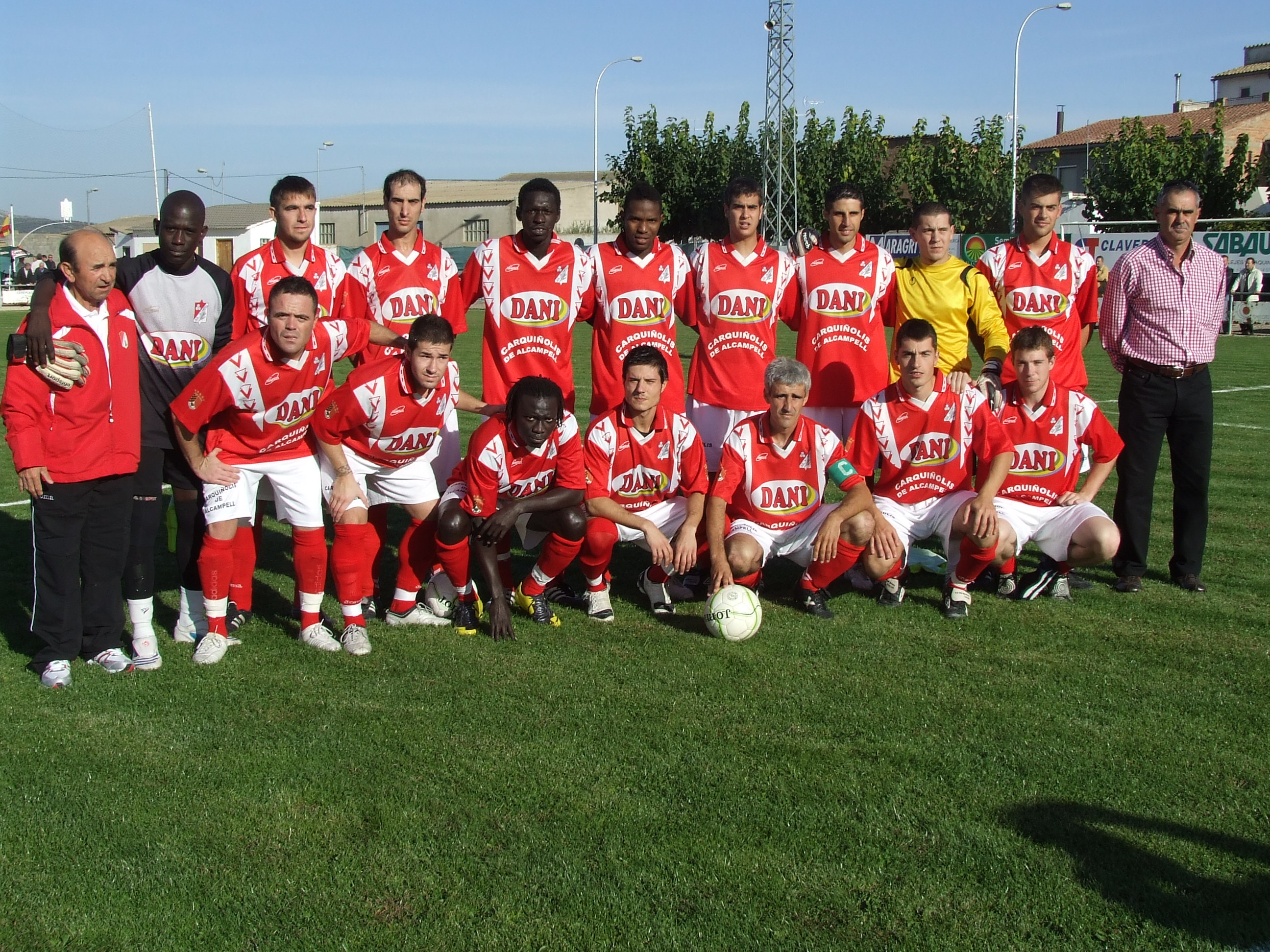 Alcampell 0 - Altorricón 2 (18.10.2009)